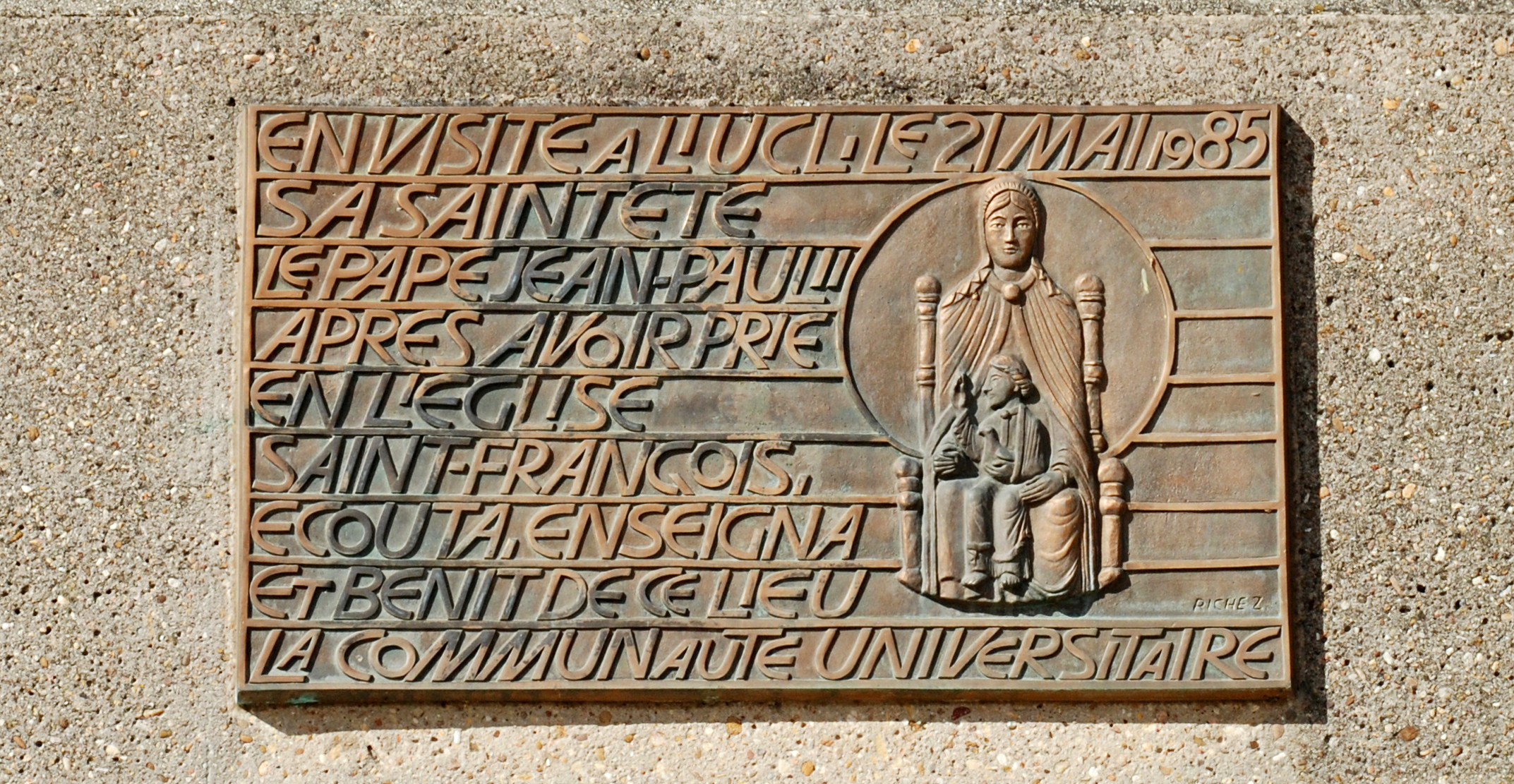 Belgique - Louvain-la-Neuve - Grand-Place - Collège Albert Descamps (faculté de théologie) This photo of immovable heritage has been taken in the Walloon Region